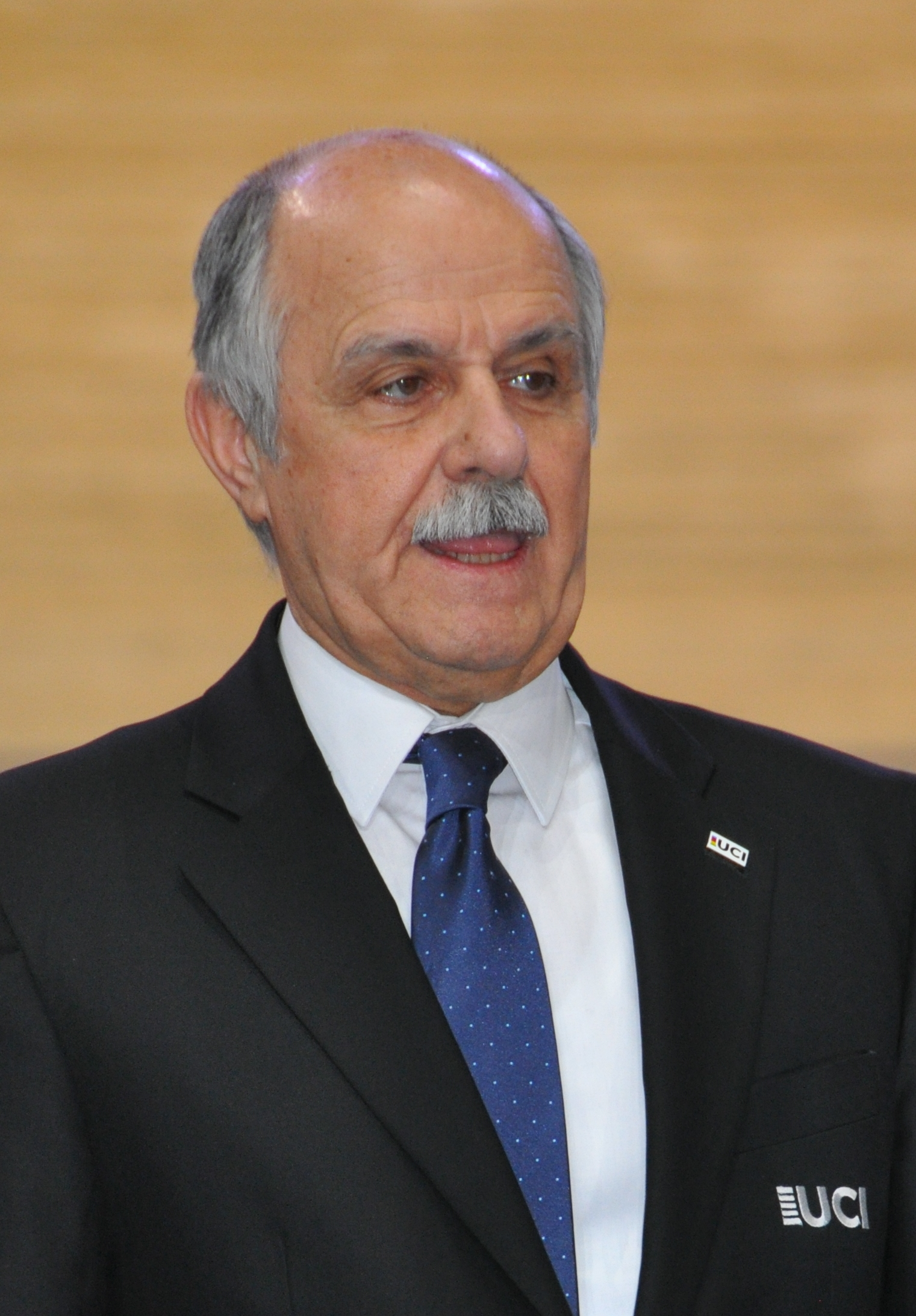 Renato DI ROCCO, Präsident des ital. Radsportverbandes und Mitglied des Vorstandes des Weltradsportverbandes UCI